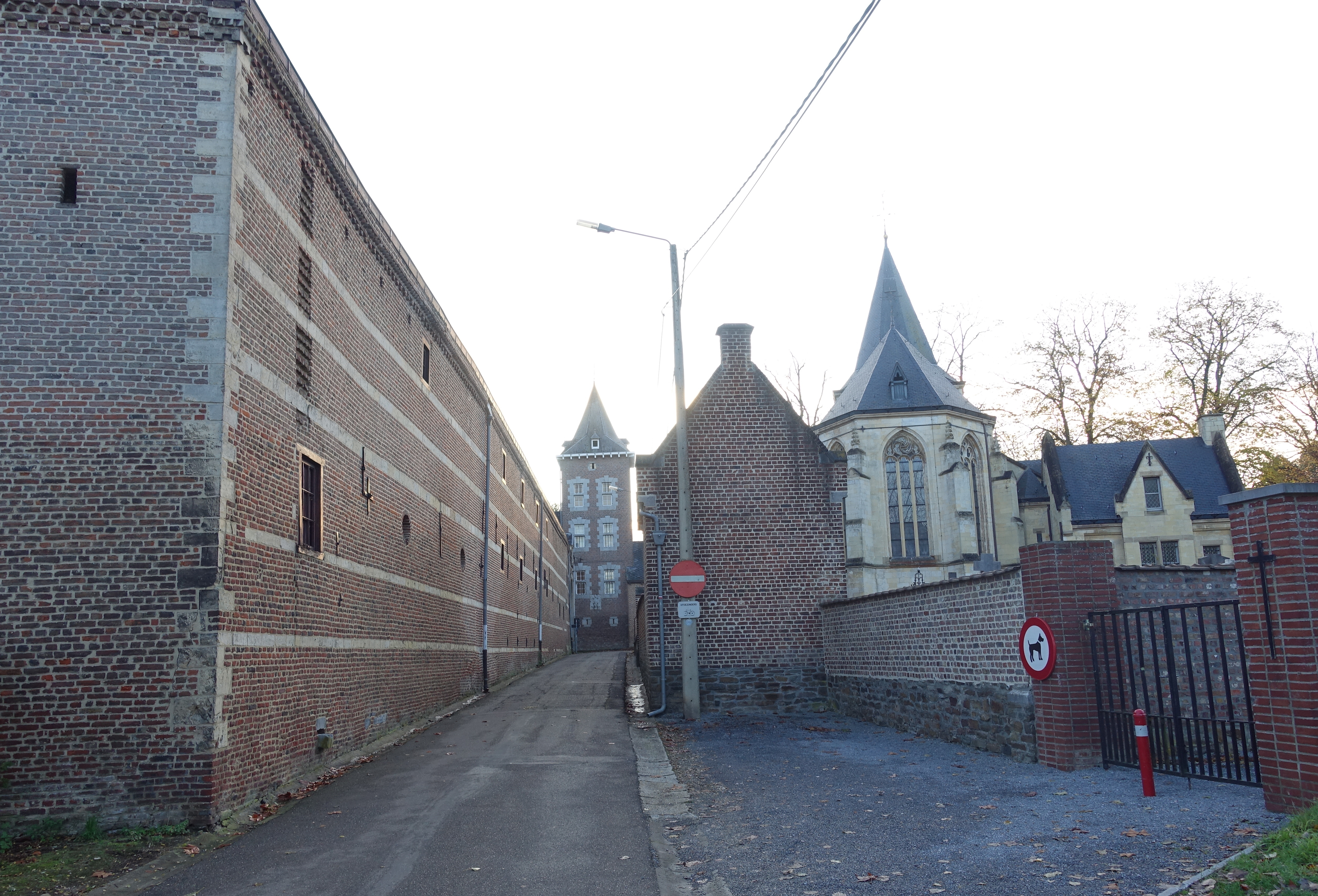 Sint-Stefanusstraat 's-Herenelderen met kerk, kerkhof en kasteelhoeve